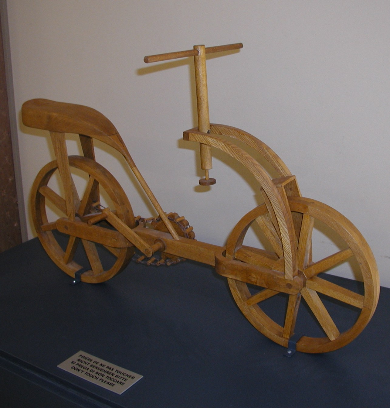 ein Modell nach Skizzen von da Vinci